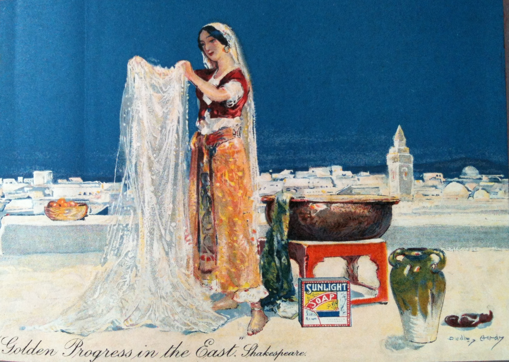 Advertising for Sunlight Soap designed by Dudley Hardy (circa 1909).